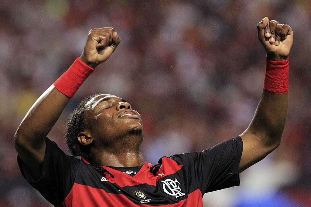 Flamengo 2 x 1 Guarani - Brasileiro 2010